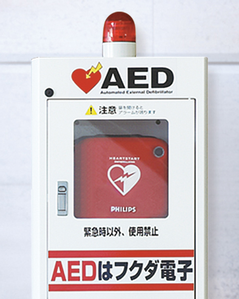 フクダ電子AED画像。